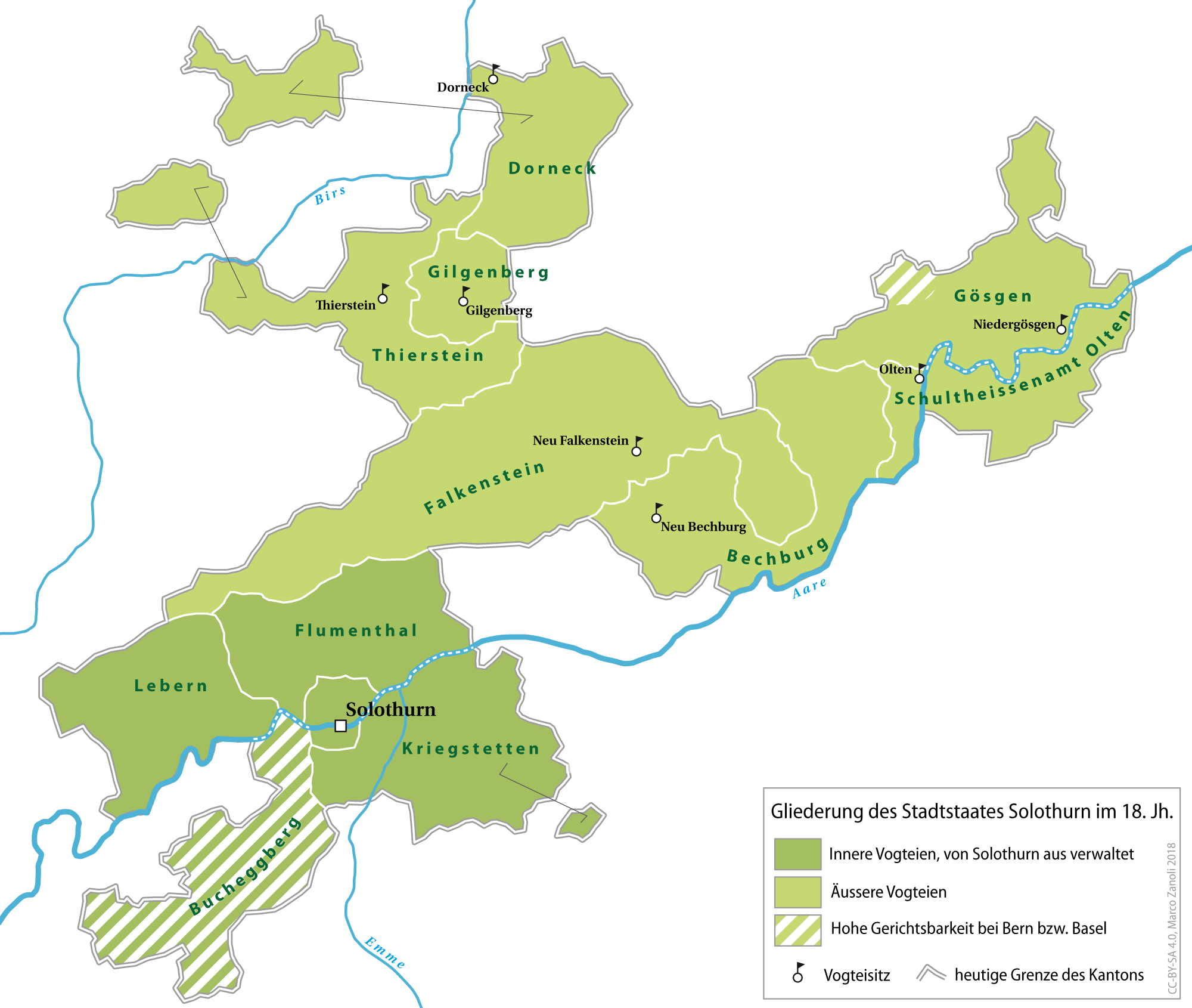 Historische Gliederung des Stadtstaates Solothurn im 18. Jahrhundert